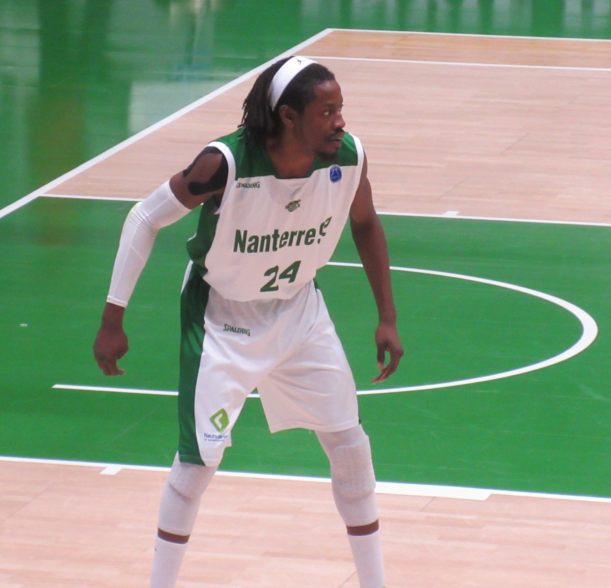 Mykal Riley avec le maillot de Nanterre 92